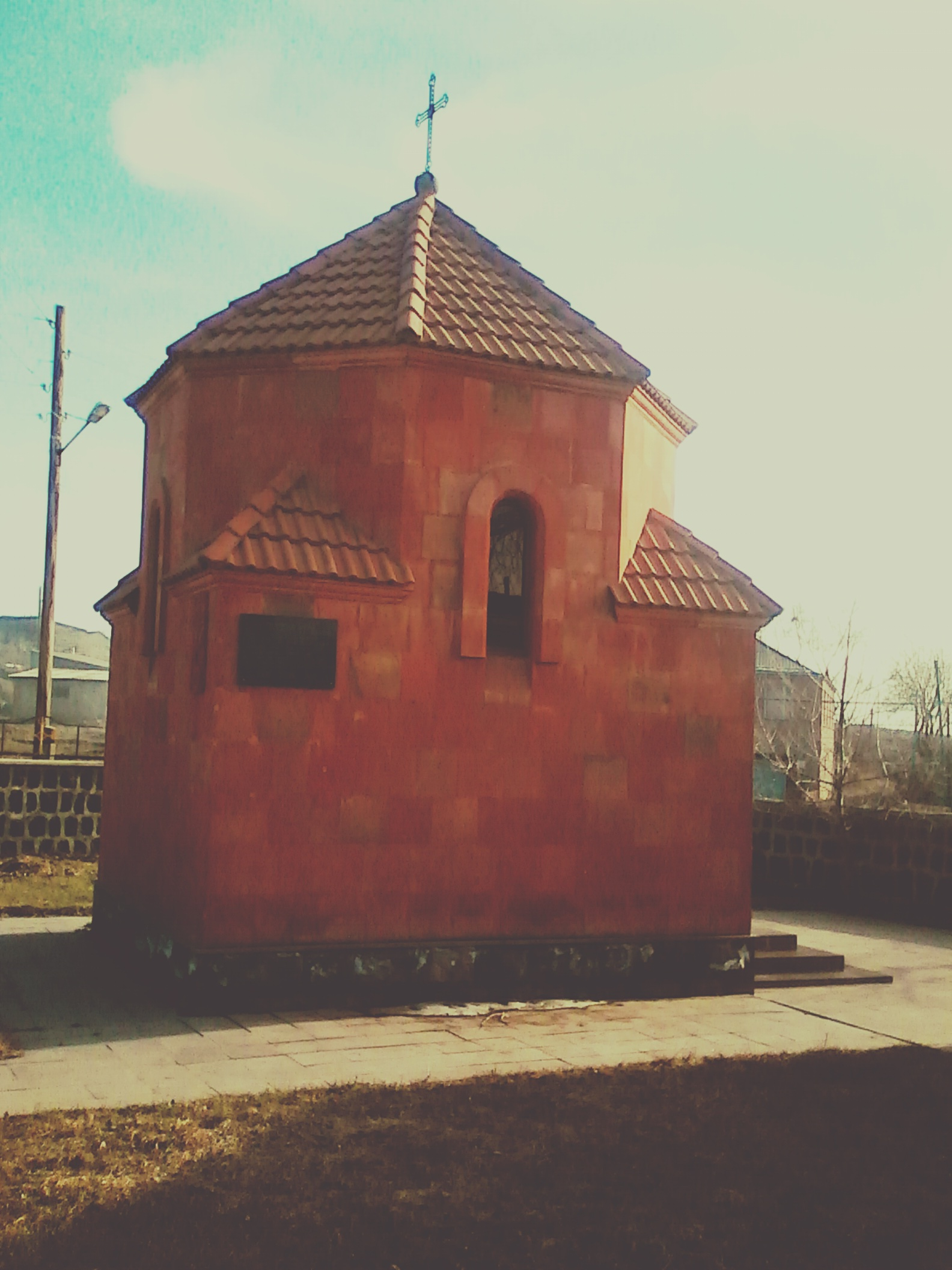 Վարսեր